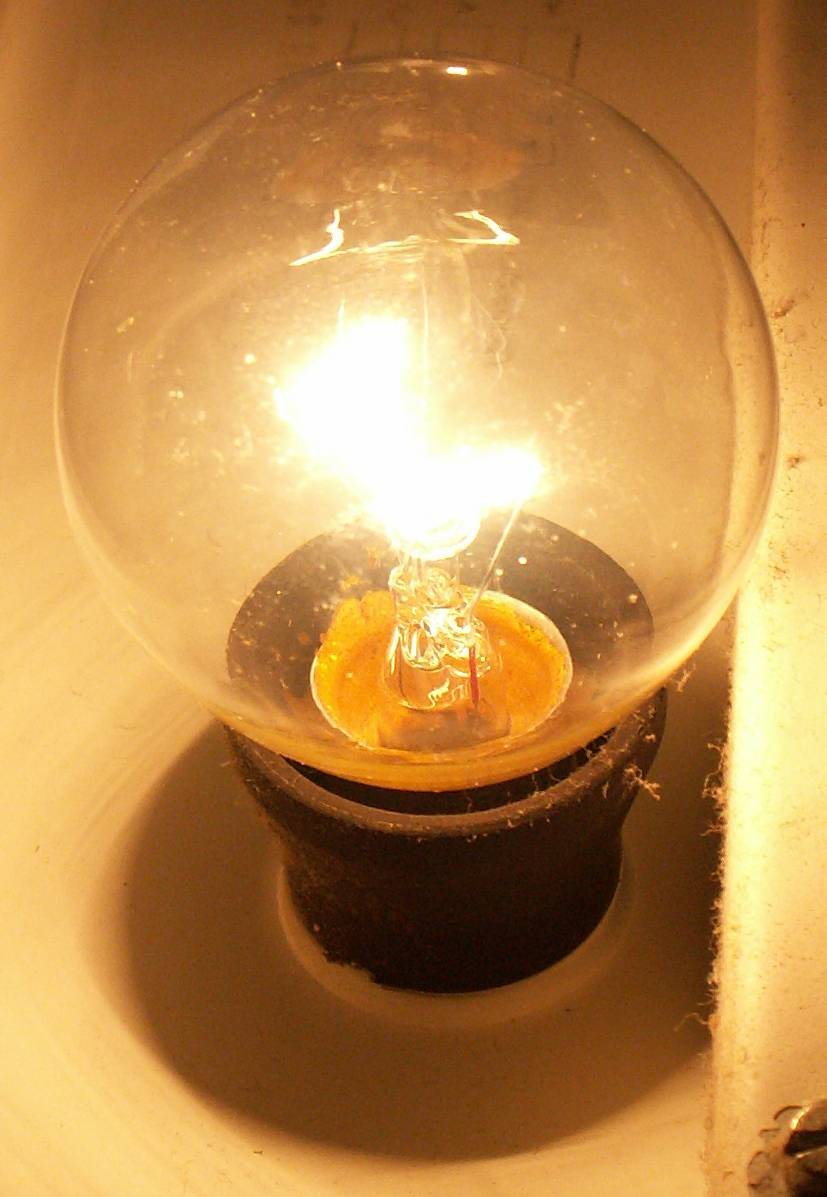 Foto einer Glühlampe, E14-40W klar von Osram.